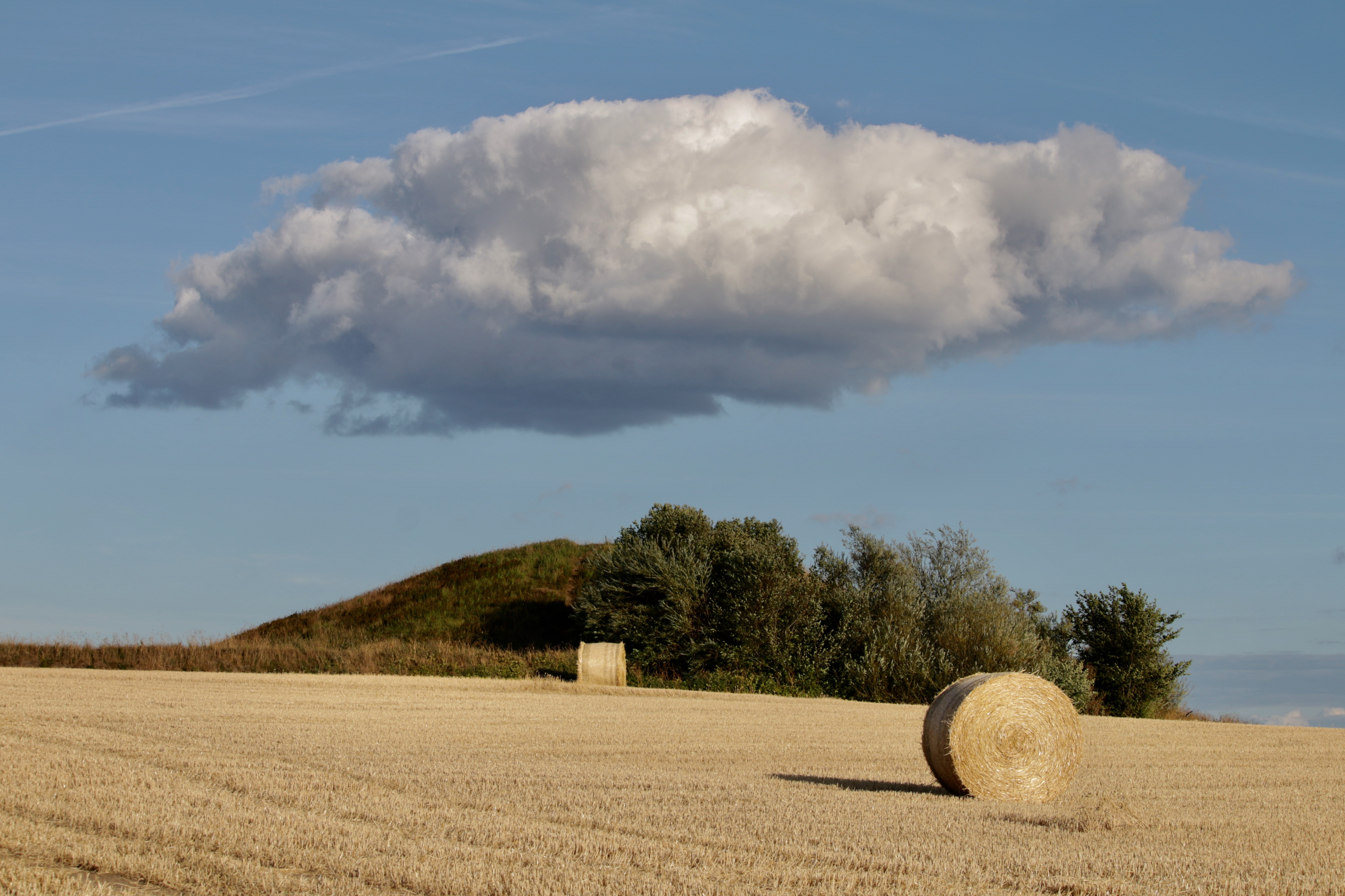 Galgbacken, Östra Vemmenhög 8-1, Hög